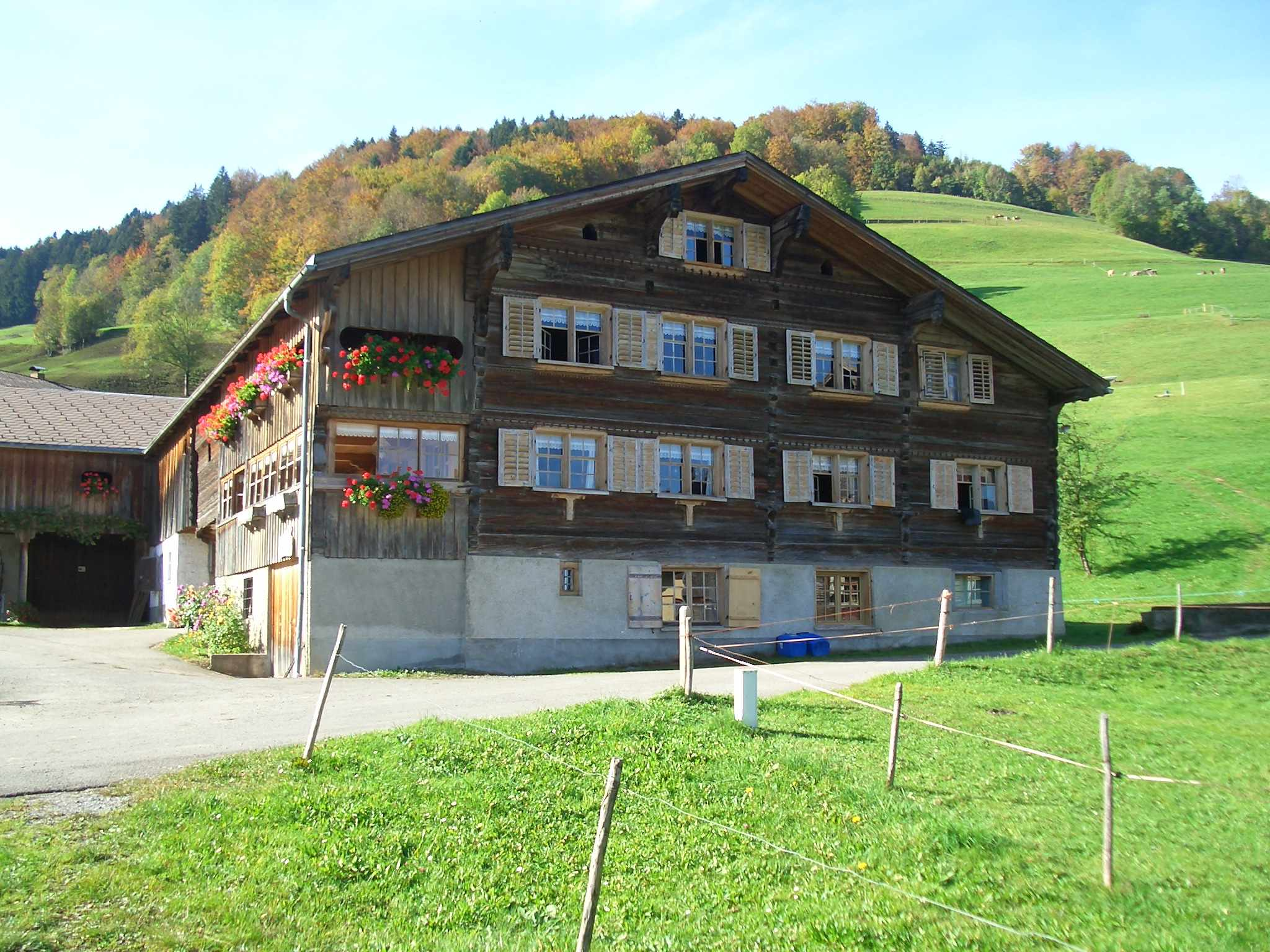 Bregenzerwaldhaus im Loch Nr.266 in Schwarzenberg / Vorarlberg / Österreich